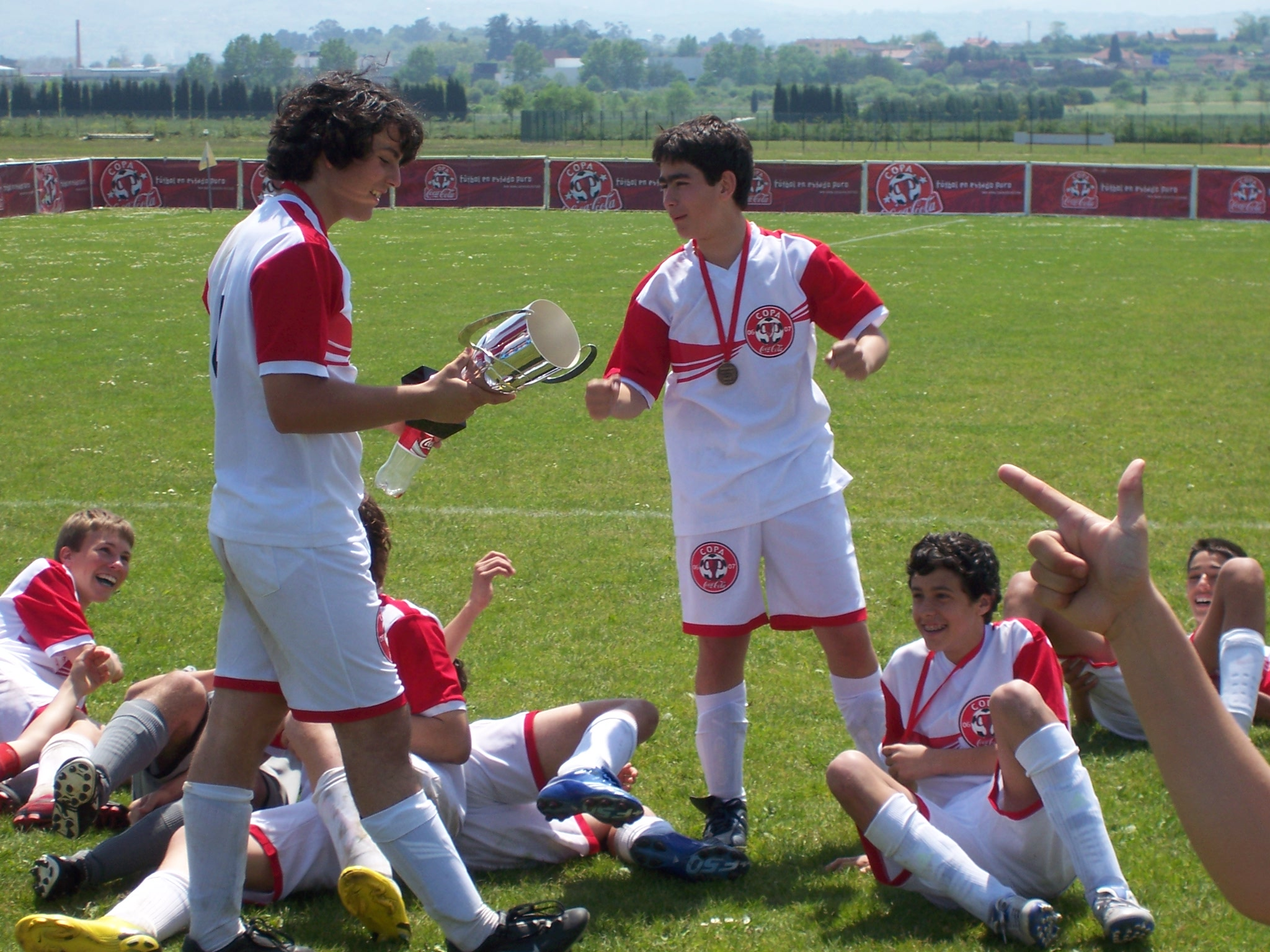 futbolistas en la copa coca-cola